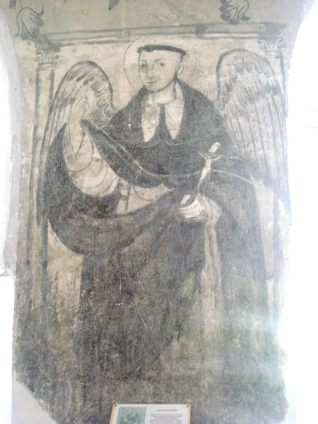 Santo Domingo de German, Oaxtepec, Morelos, Mexico